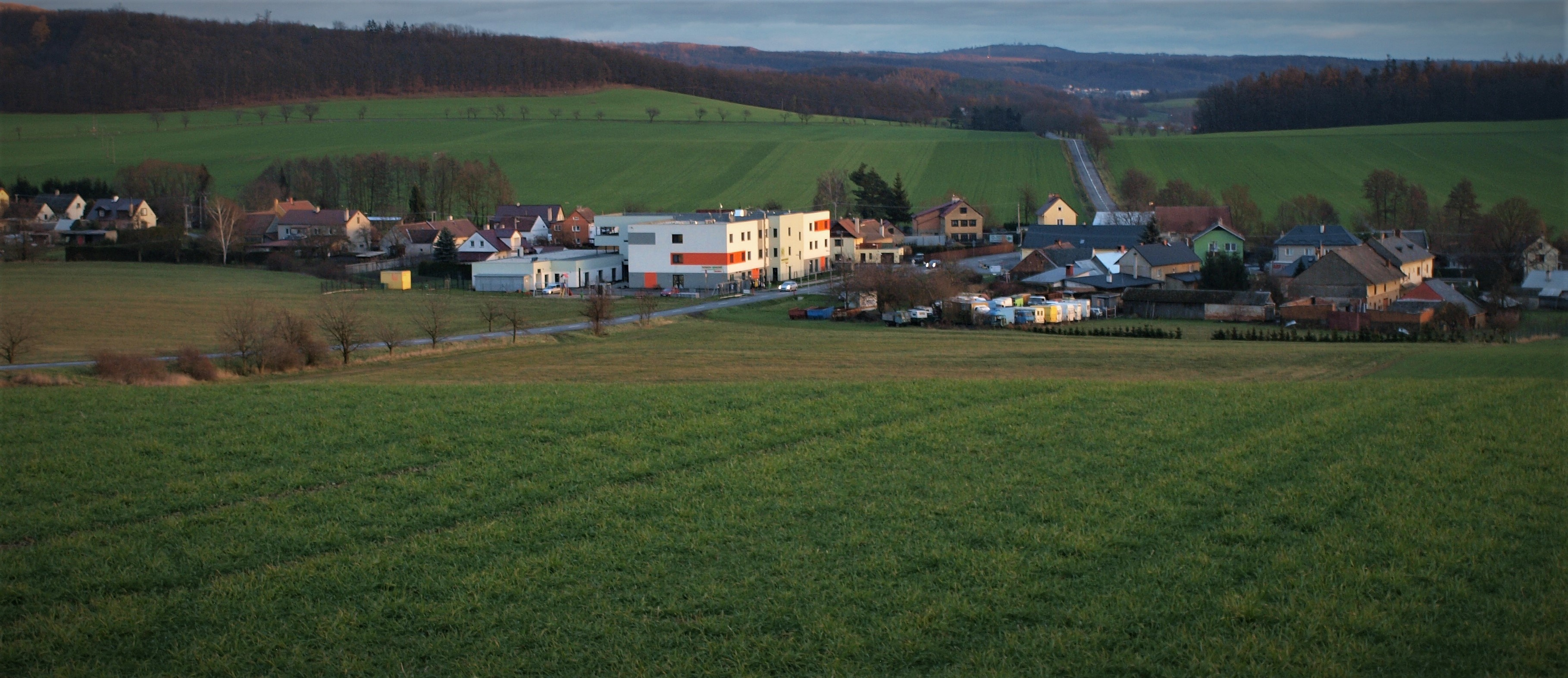 Pohled na obec (Komárov, okres Olomouc) od severu.